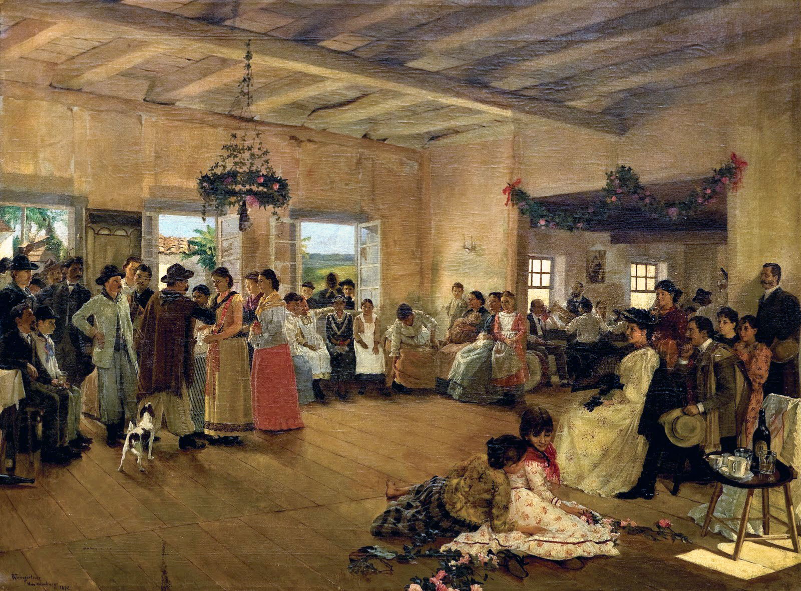 Kerb